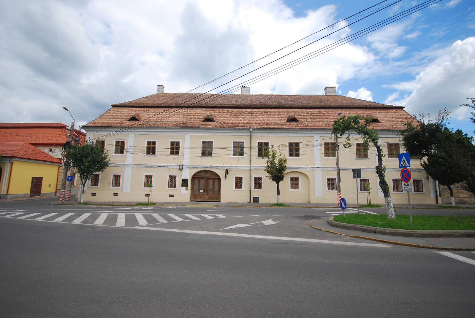 Biblioteca Teleky-Bolyai